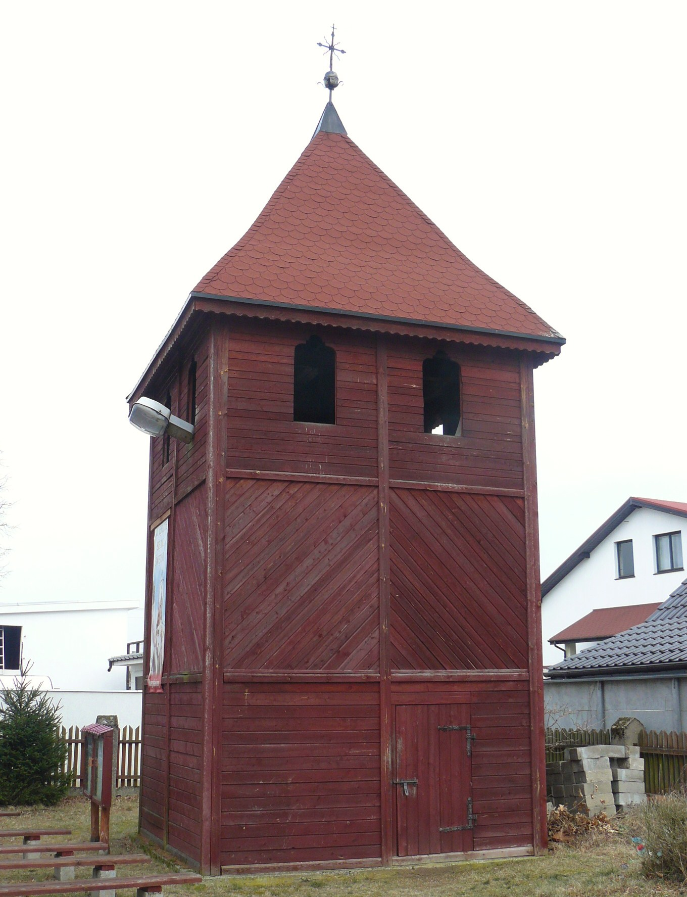 Biała - dzwonnica przy rzymskokatolickim kościele filialnym pw. Matki Boskiej Różańcowej